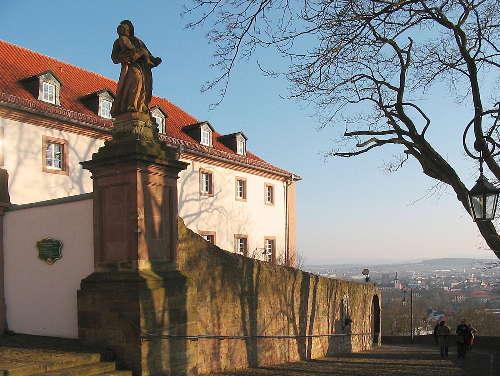 Blick auf das Profil des Gästehauses Kloster Frauenberg. Sowie Blick in Richtung Barockviertel.